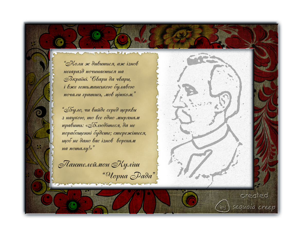 Пантелеймон Куліш "Чорна Рада"